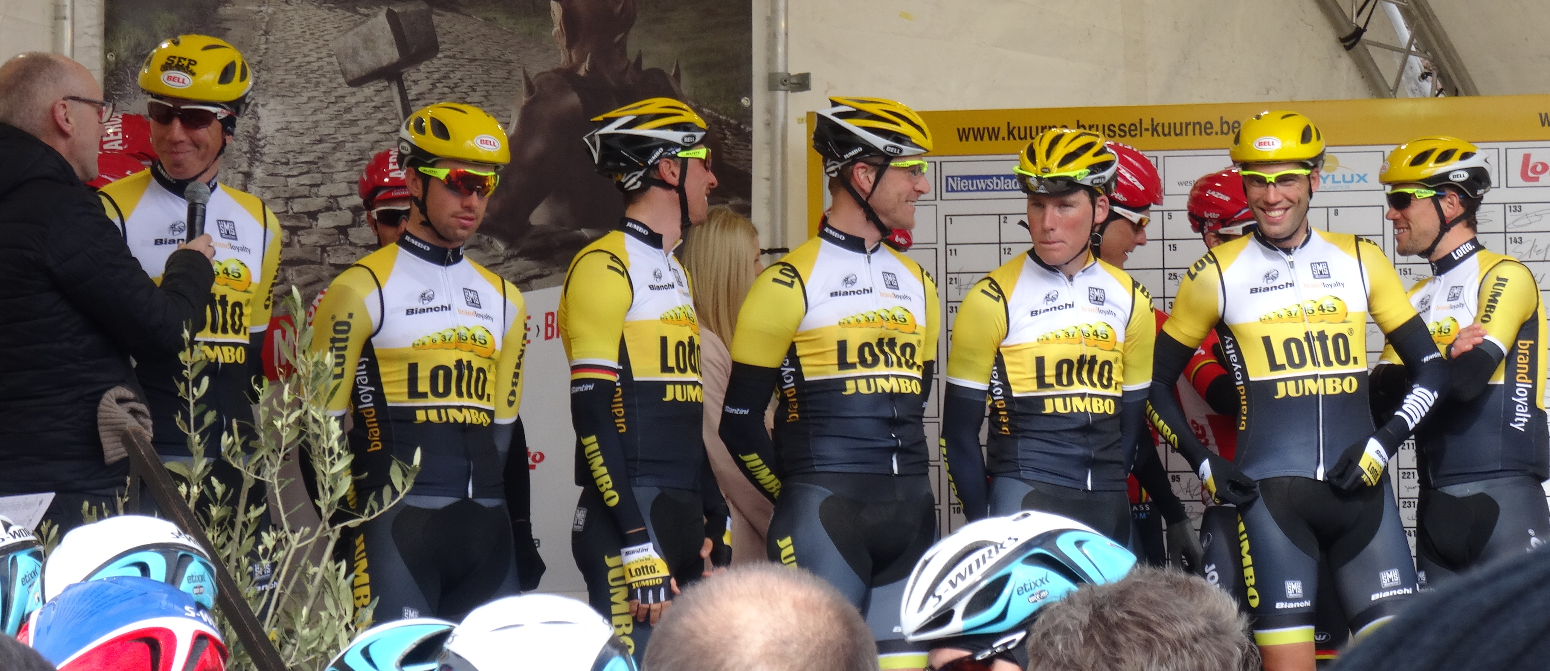 Reportage réalisé le dimanche 1er mars à l'occasion du départ et de l'arrivée de Kuurne-Bruxelles-Kuurne 2015 à Kuurne, Belgique.